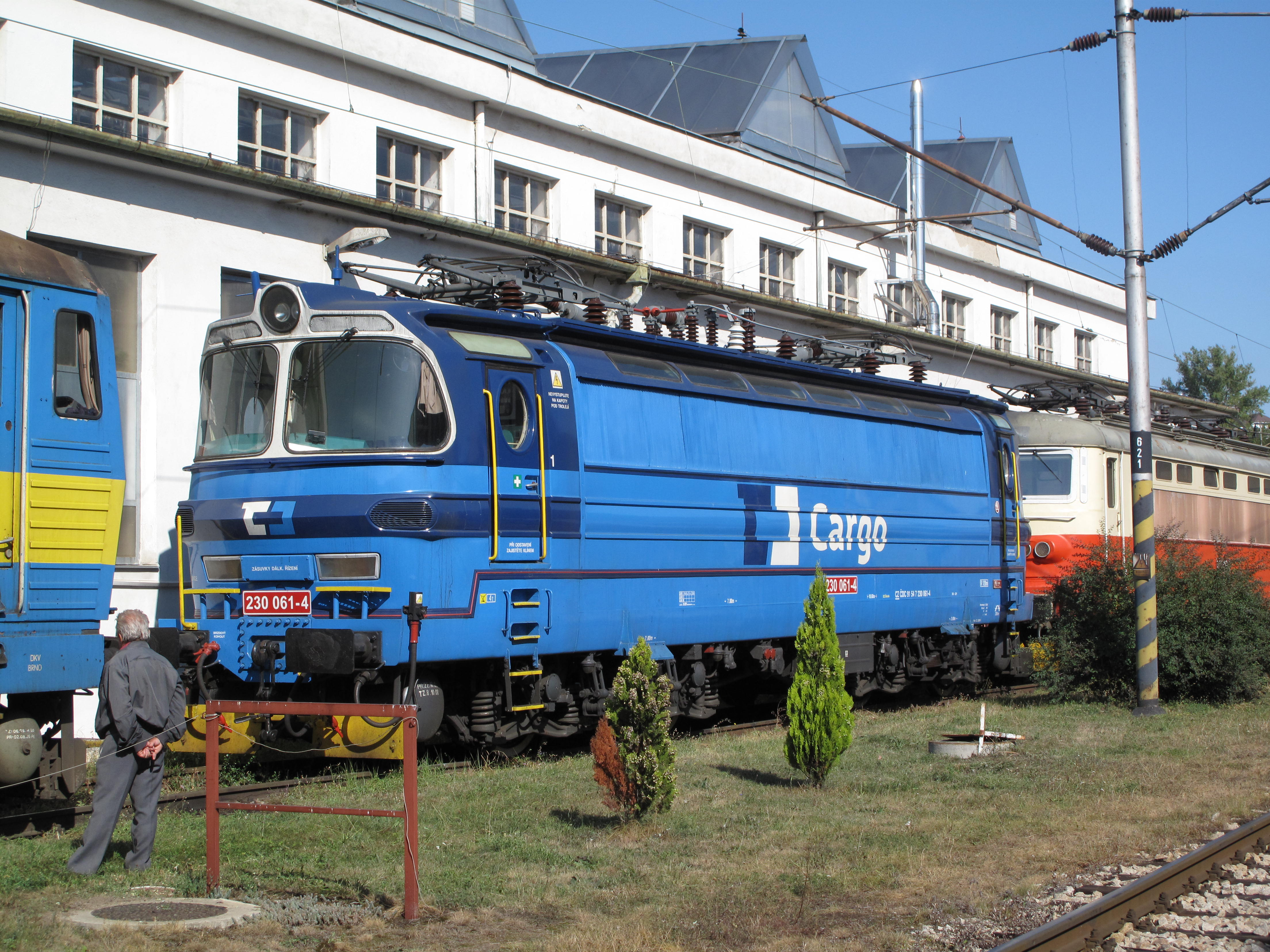 Lokomotiva 230 v Maloměřicích